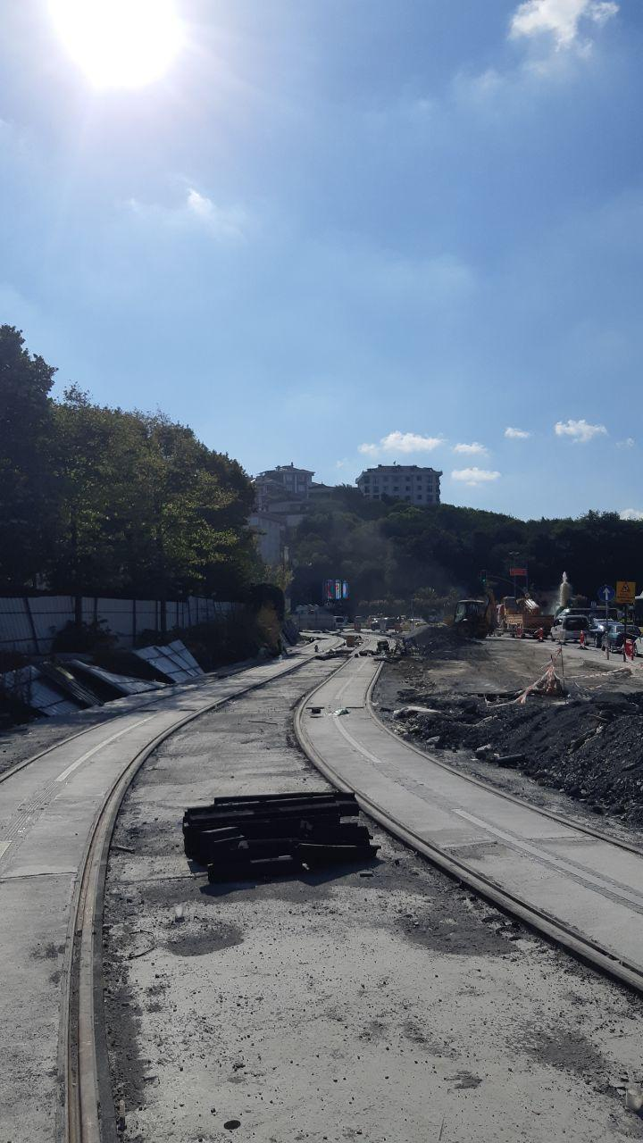 T5 (İstanbul metrosu) Alibeyköy durağı